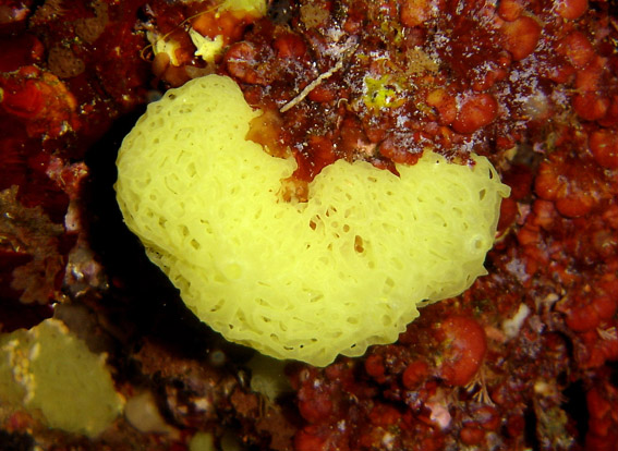 Clathrina clathrus (Porifera) (Croatie) (Photo personnelle)